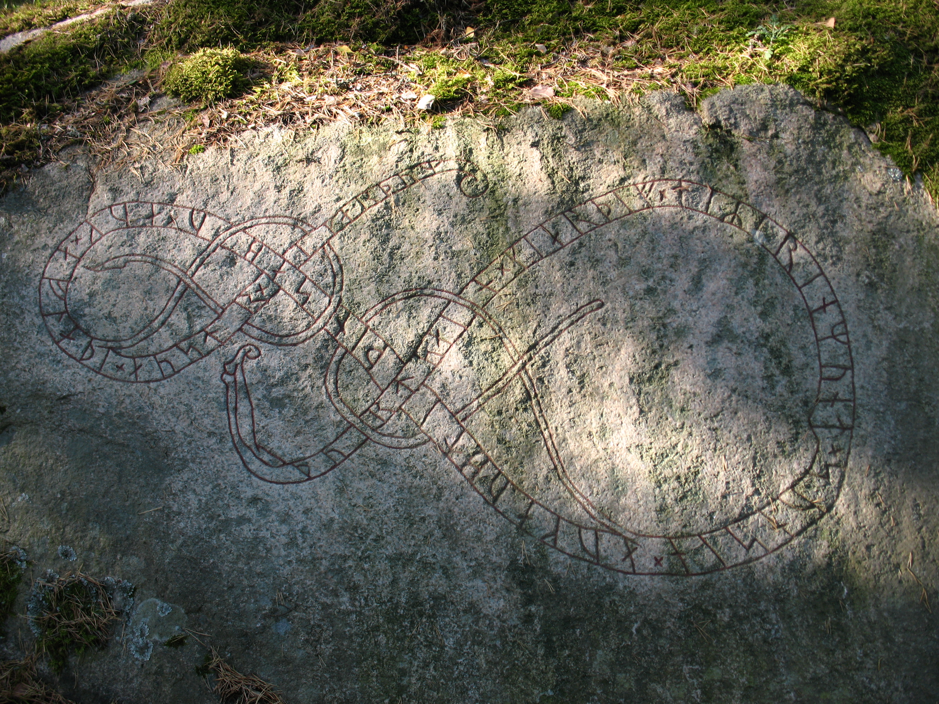 Runestone U 209, Angarn.